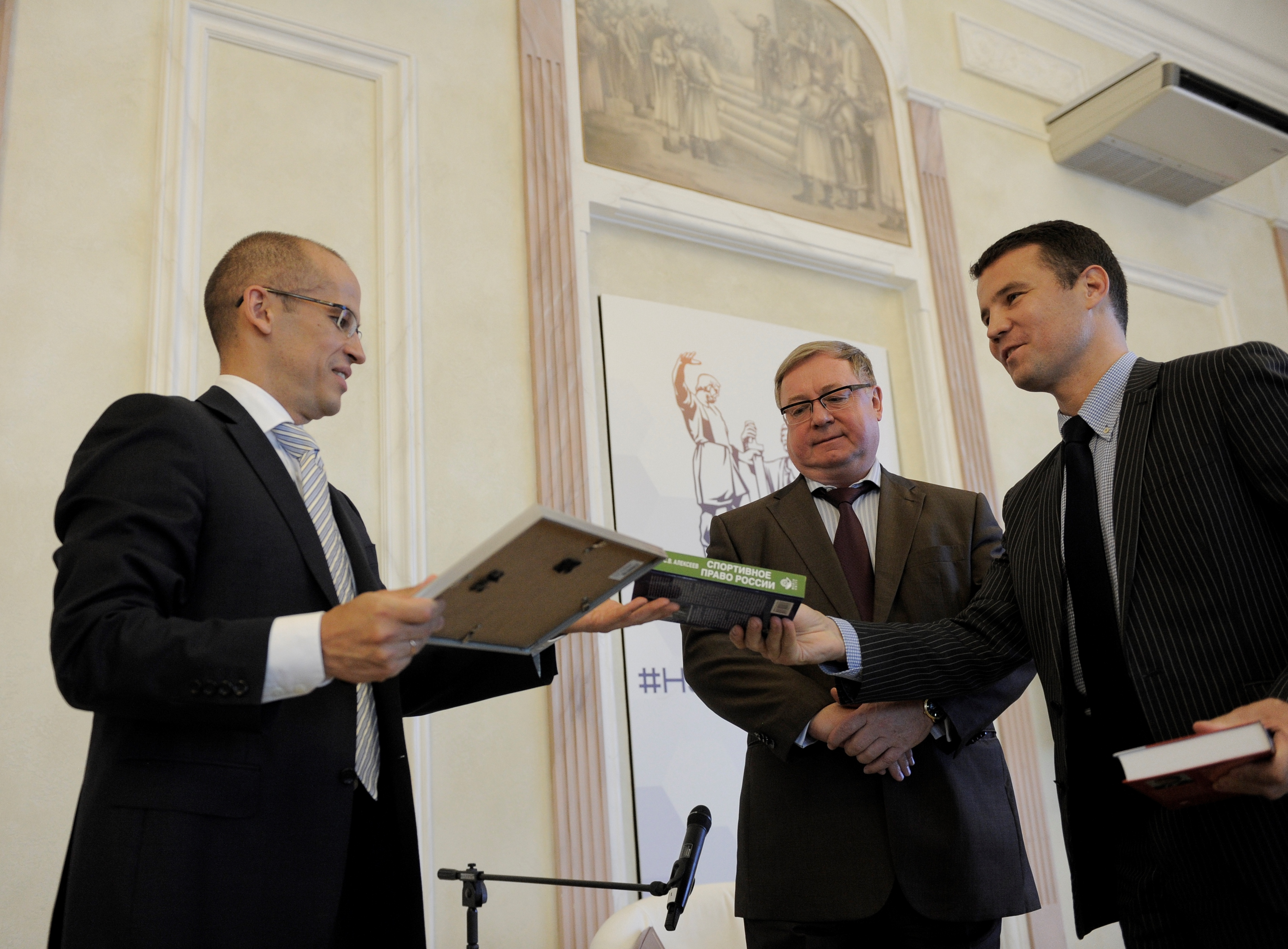 Вручение Алексееву С.В. почетной грамоты в Общественной палате Российской Федерации (секретарь Общественной палаты Бречалов А.В. и и выдающийся государственный деятель Степашин С.В.) на встрече клуба #Нулевыечтения